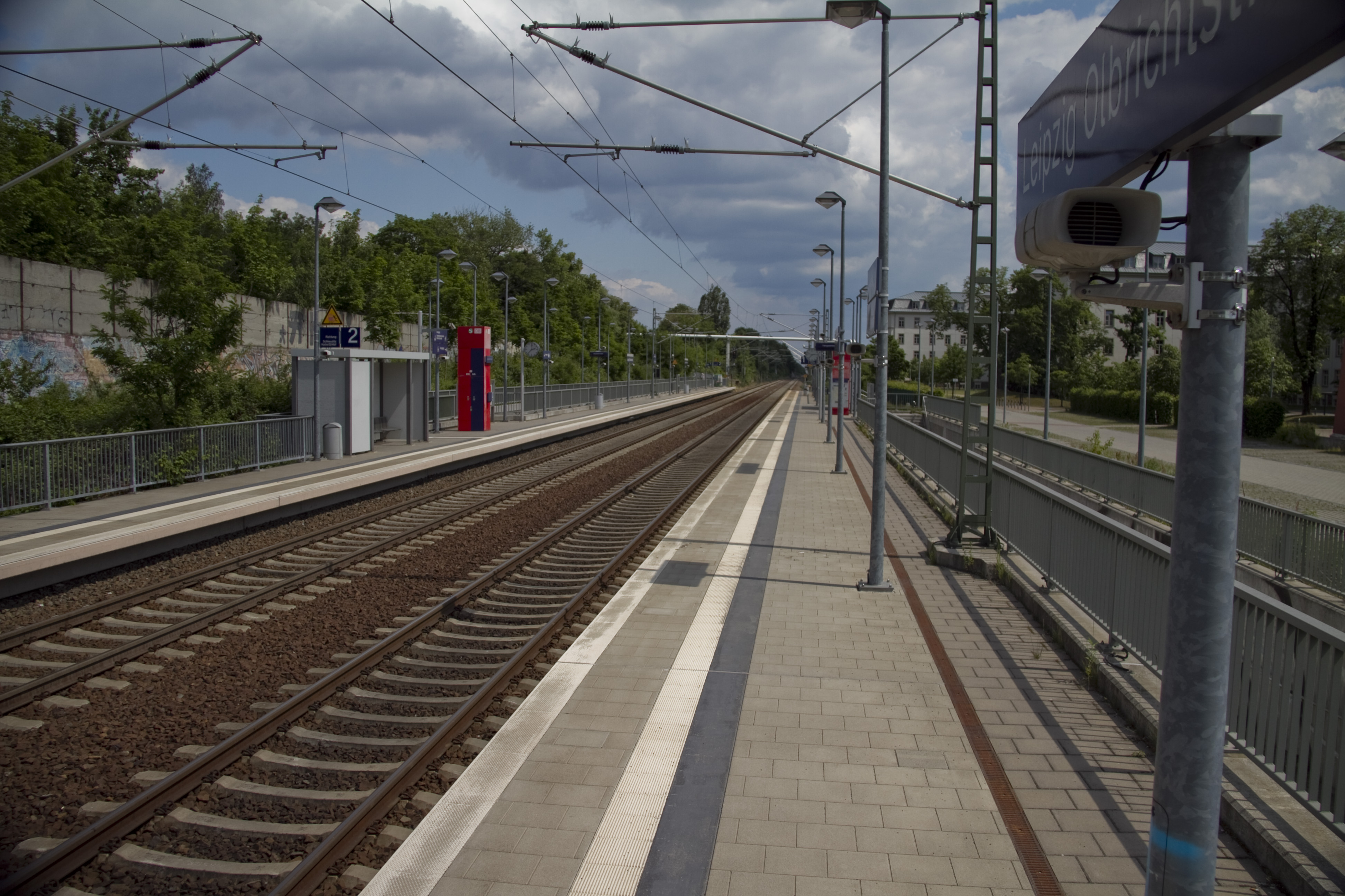 S-Bahn Station Leipzig Olbrichtstraße